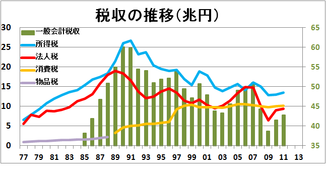 日本の税収の推移